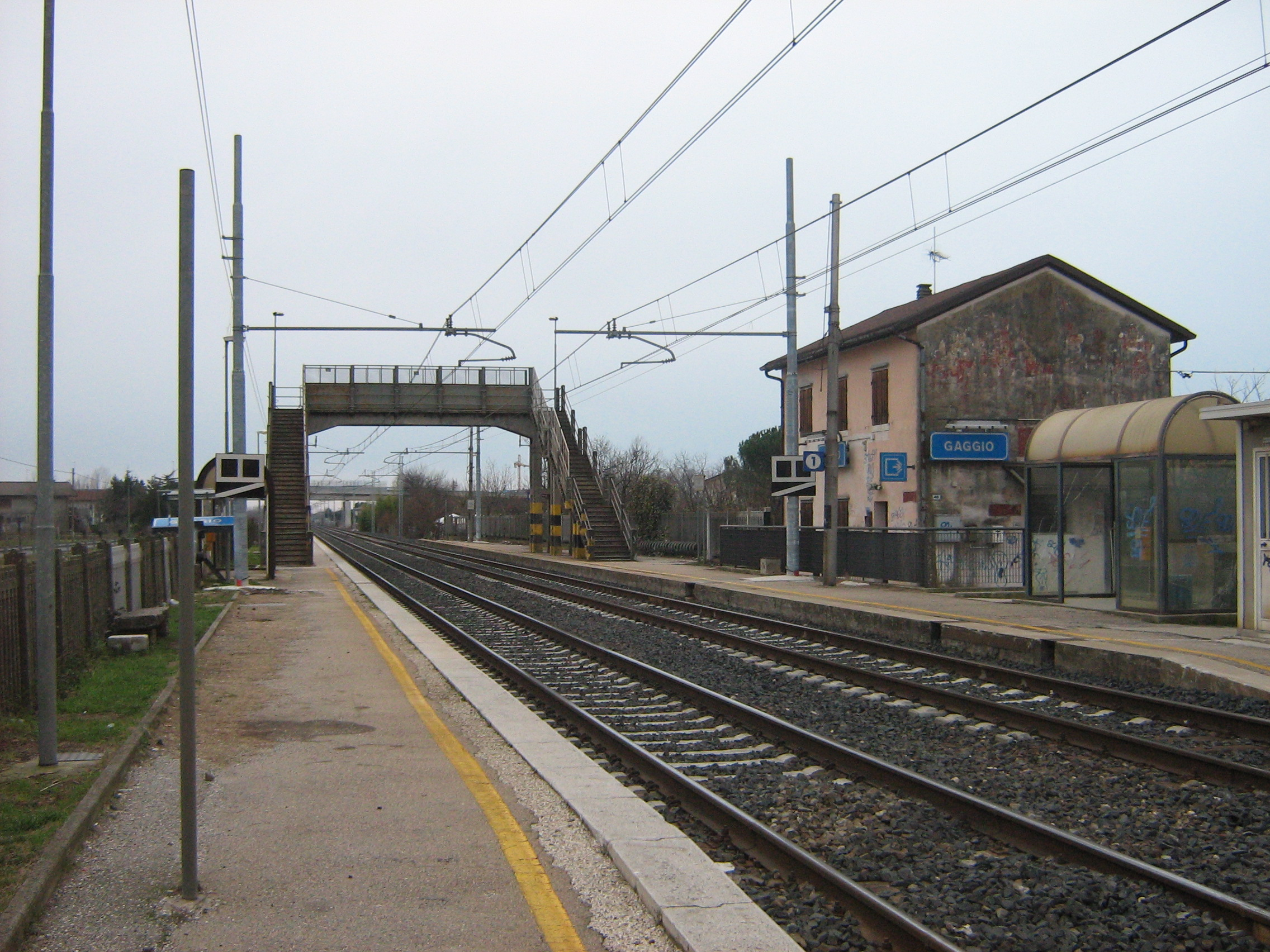 Gaggio